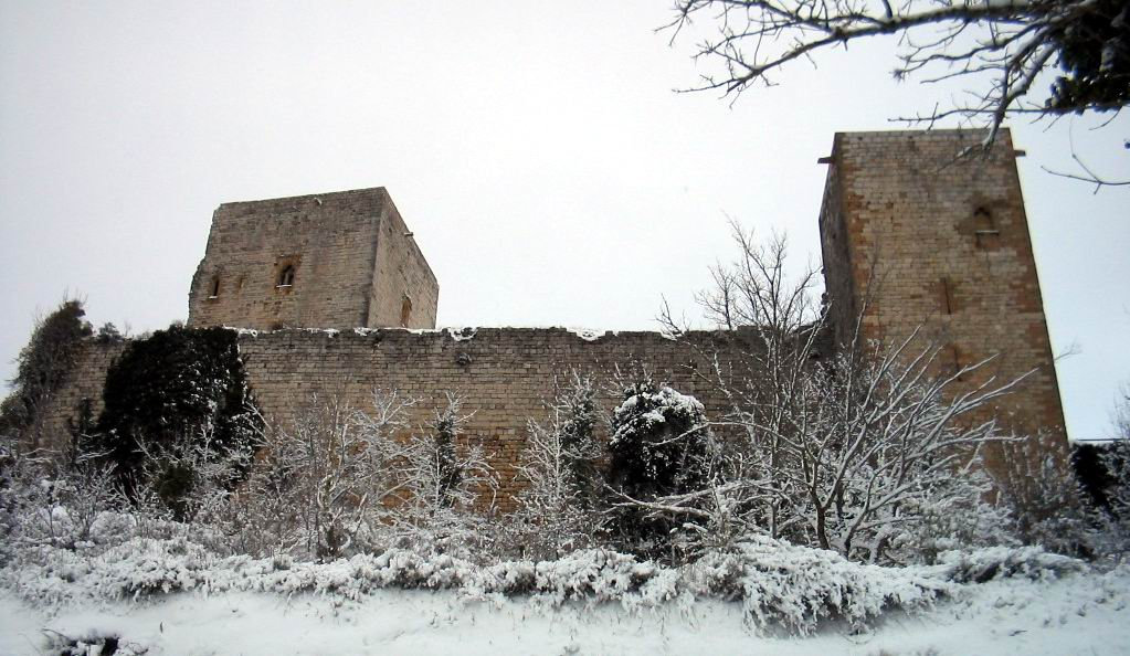 chateau de Puivert.